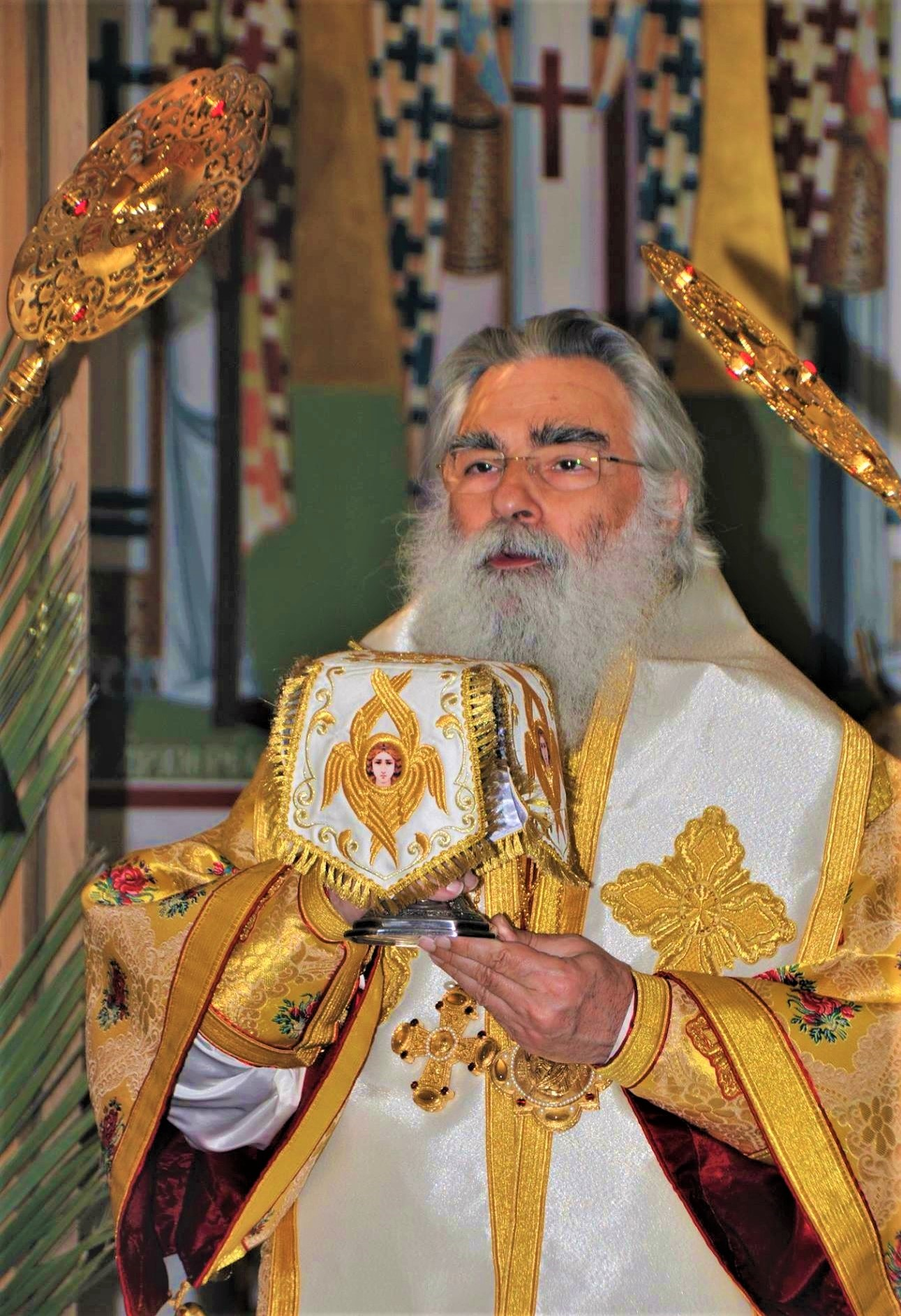 Тимофей, митрополит Иерусалимского Патриархата, ноябрь 2019 г., Никосия